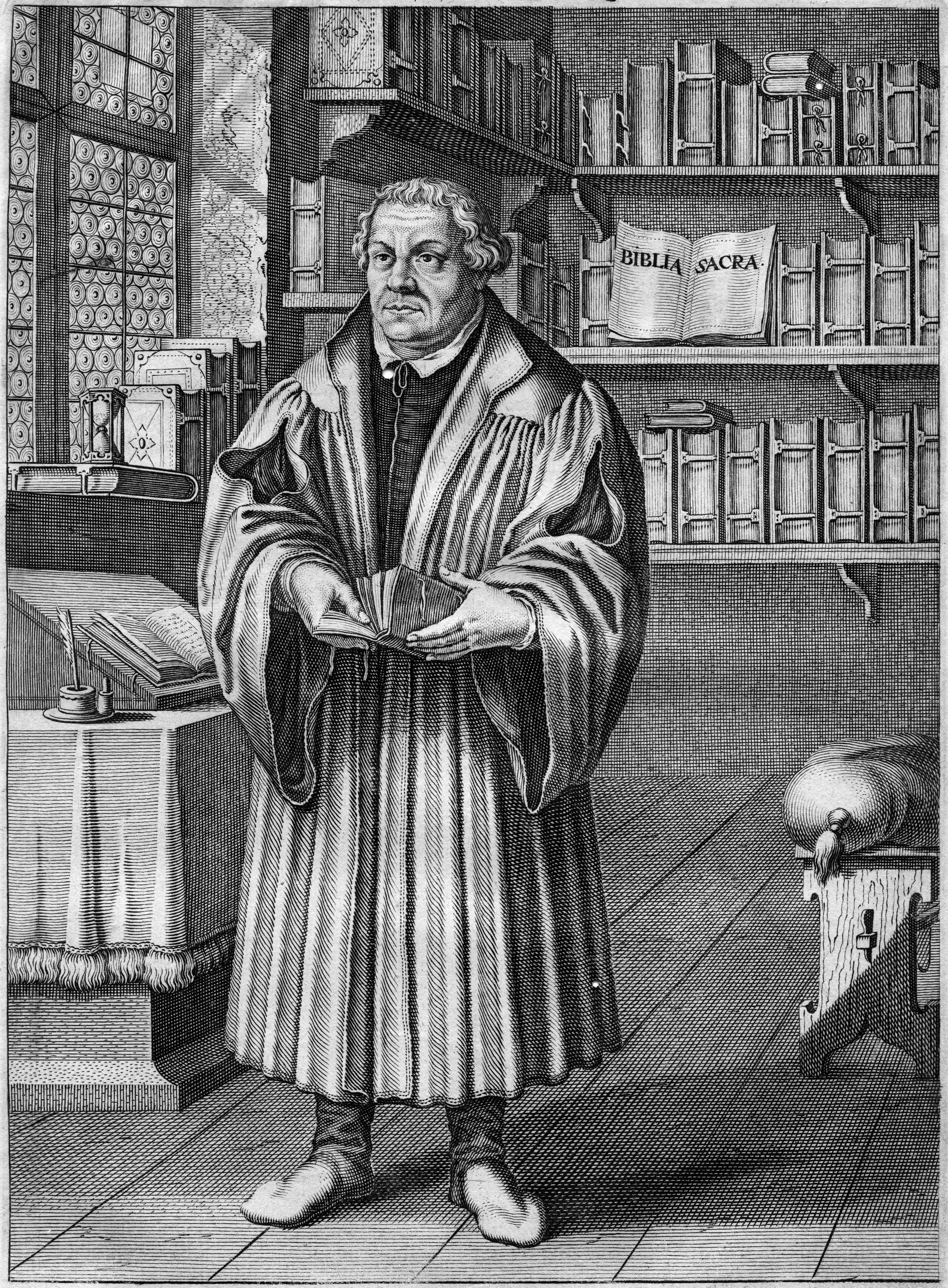 portrait gravé